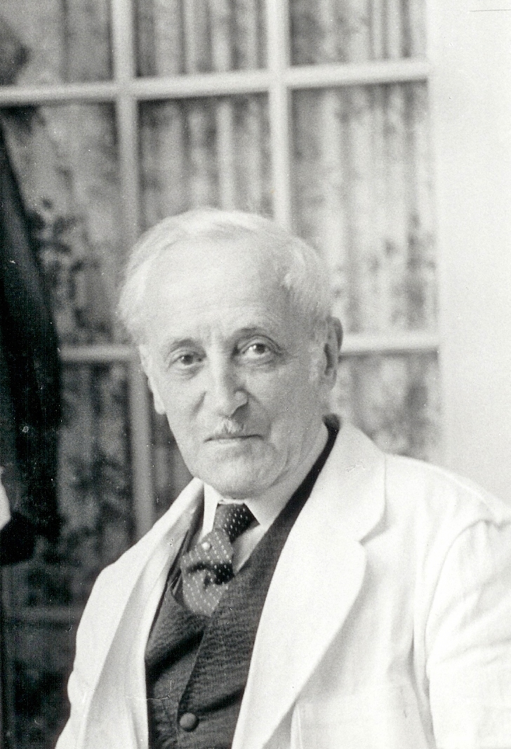 Portraitfoto Gustav Adolf Daumillers